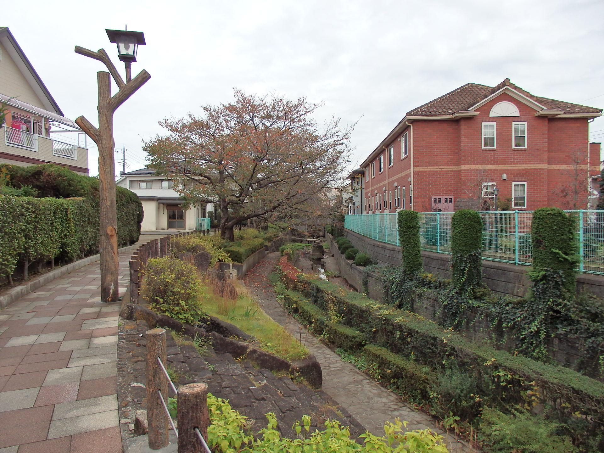 緑道沿いの幸福川